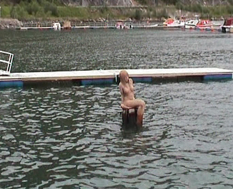 Die kleine Meerjungfrau im Hafen von Rognan, Norwegen